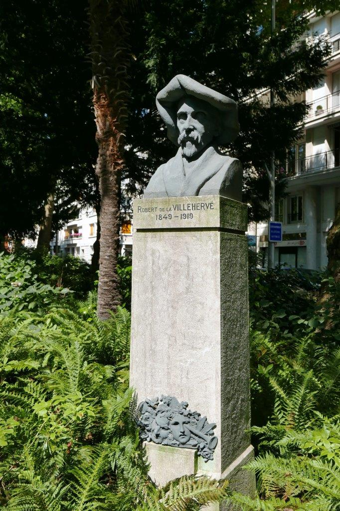 Statue de Robert de la Villehervé